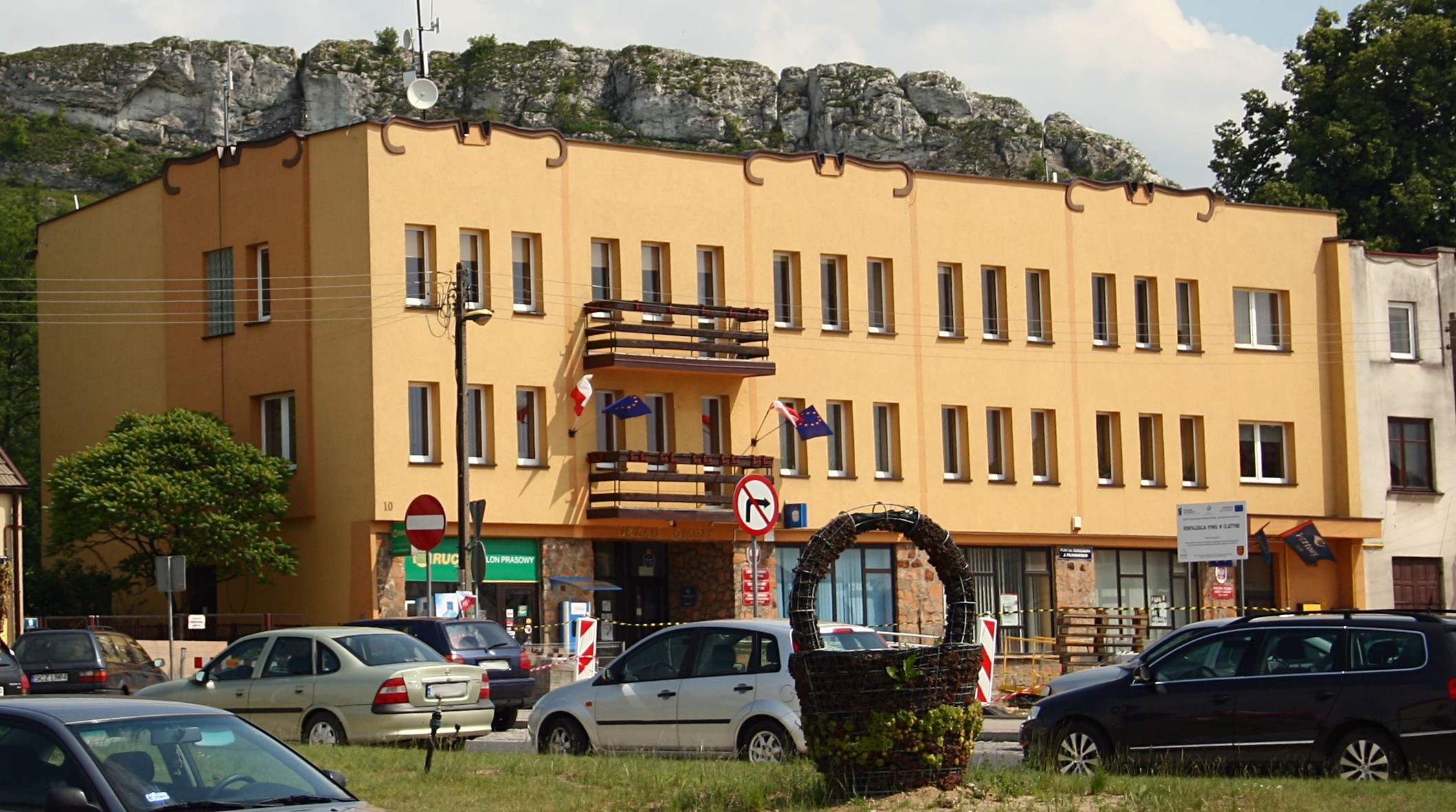 Budynek urzędu gminy w Olsztynie, woj. śląskie